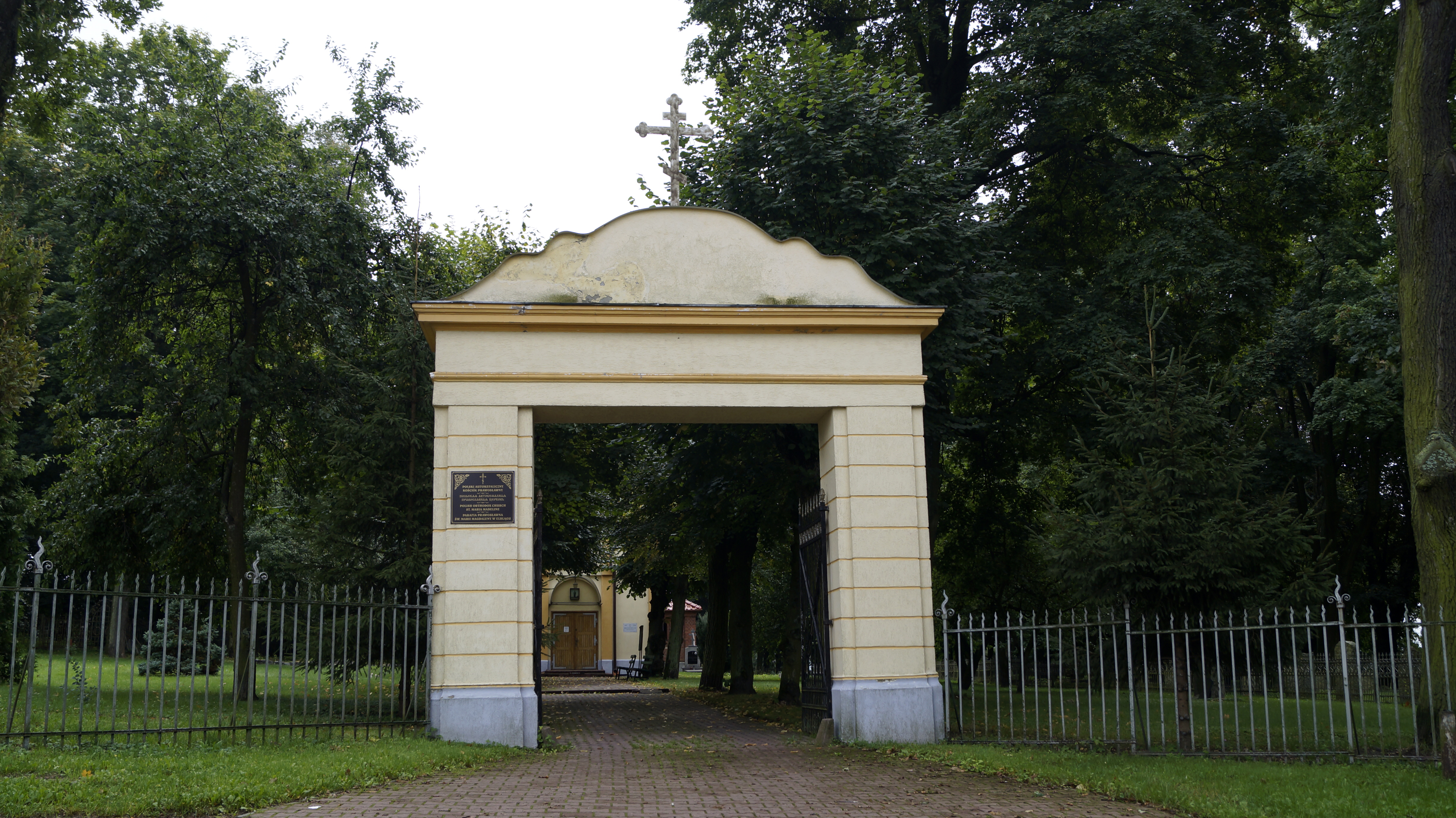 Elbląg, brama wjazdowa